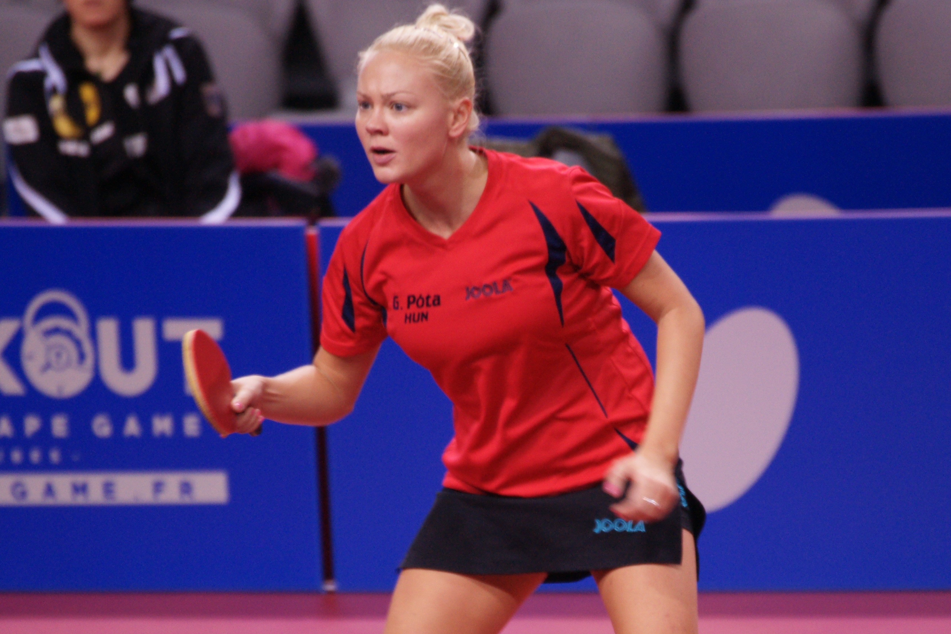 Georgina Póta, Top 16 Antibes 2017